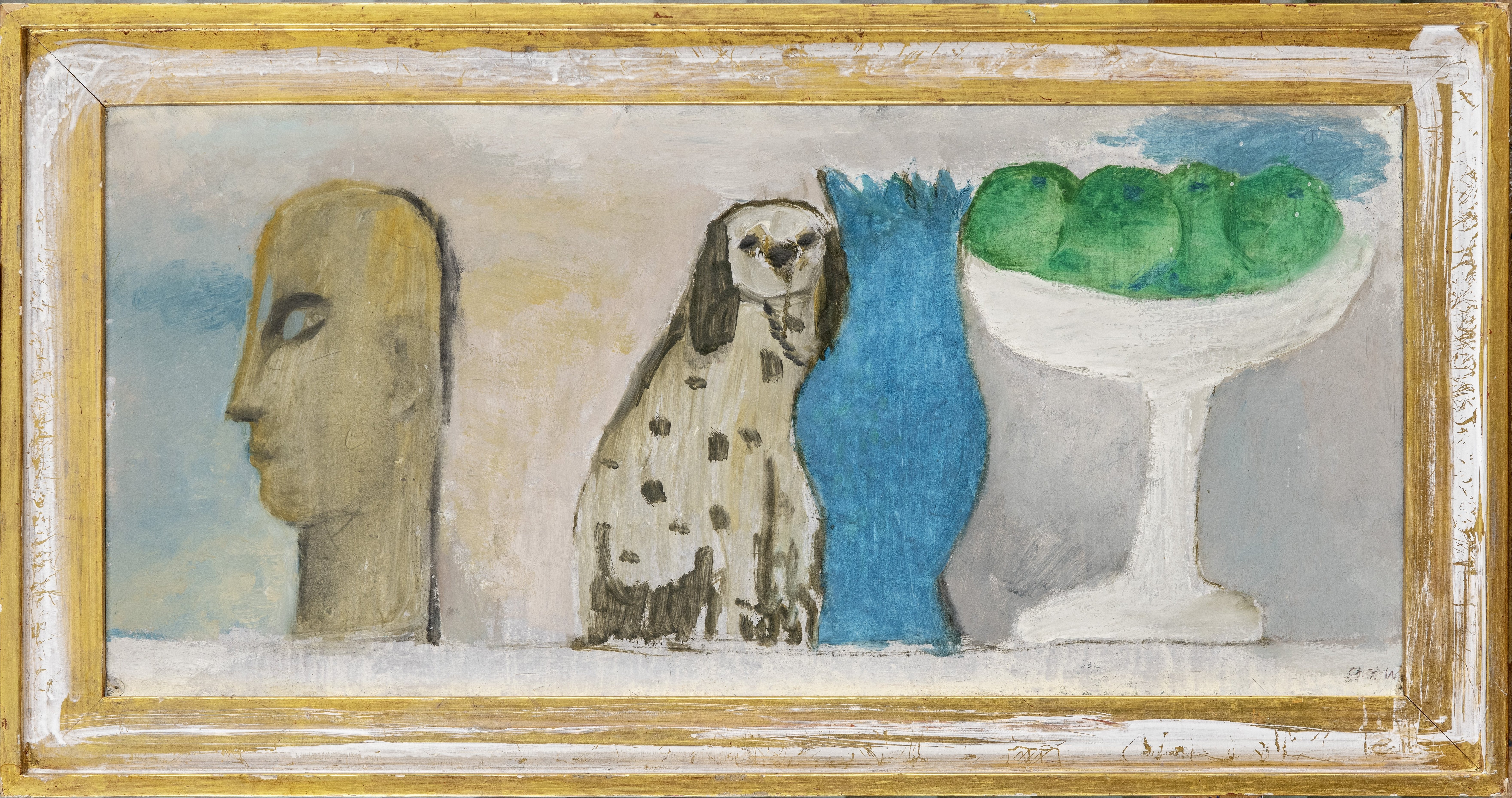 Gudrun Irene Widmann Gemälde-Katalog-050, Stillleben mit Hündchen, 1974, Mischtechnik auf Malpappe, 30 x 64 cm, Privatbesitz